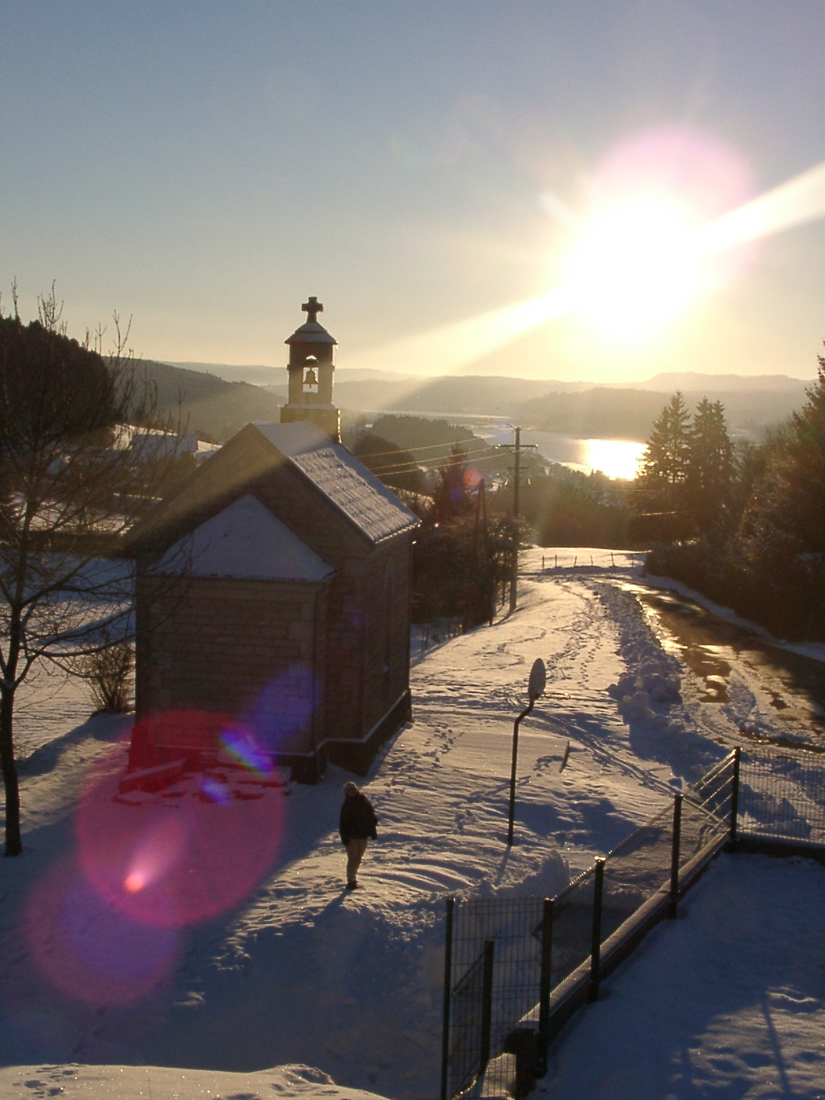 Auteur: Utilisateur:Suaudeau Description: Vue du lac de Saint-Point depuis le belvédère de la commune de Montperreux.